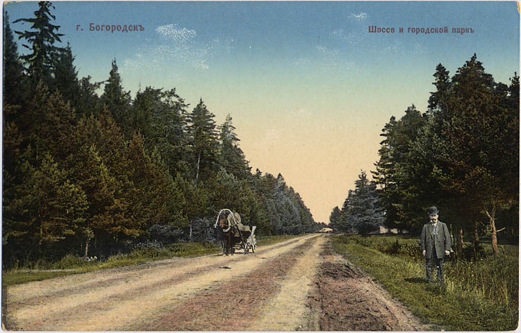 Владимирка в Богородске. Шоссе и парк. Старинная открытка